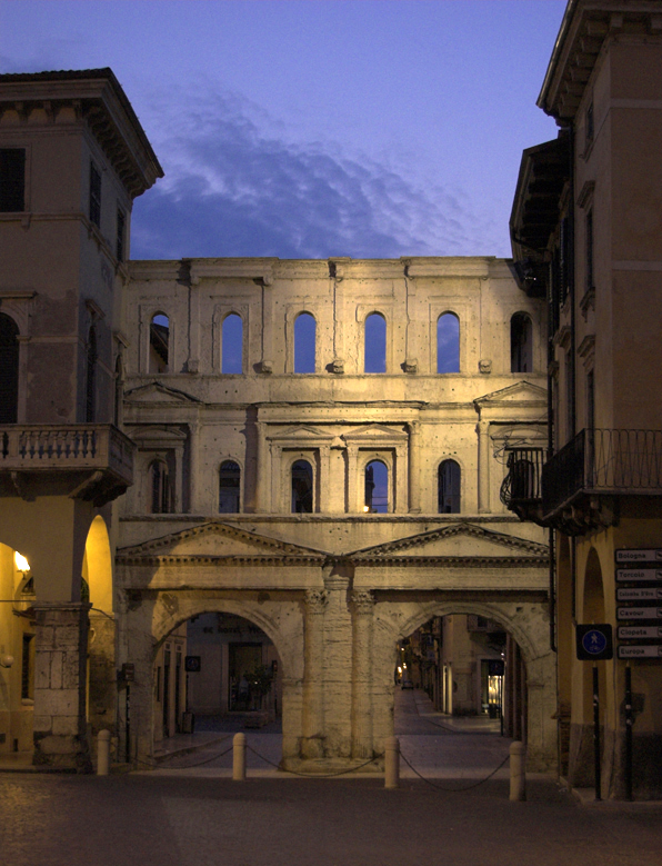 La romana porta Borsari a Verona